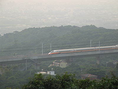 高鐵進入彰化八卦山。Bân-lâm-gú: Ko-thih tsìn-ji̍p Tsiong-huà Pat-kuà-suann. 高鐵進入彰化八卦山。